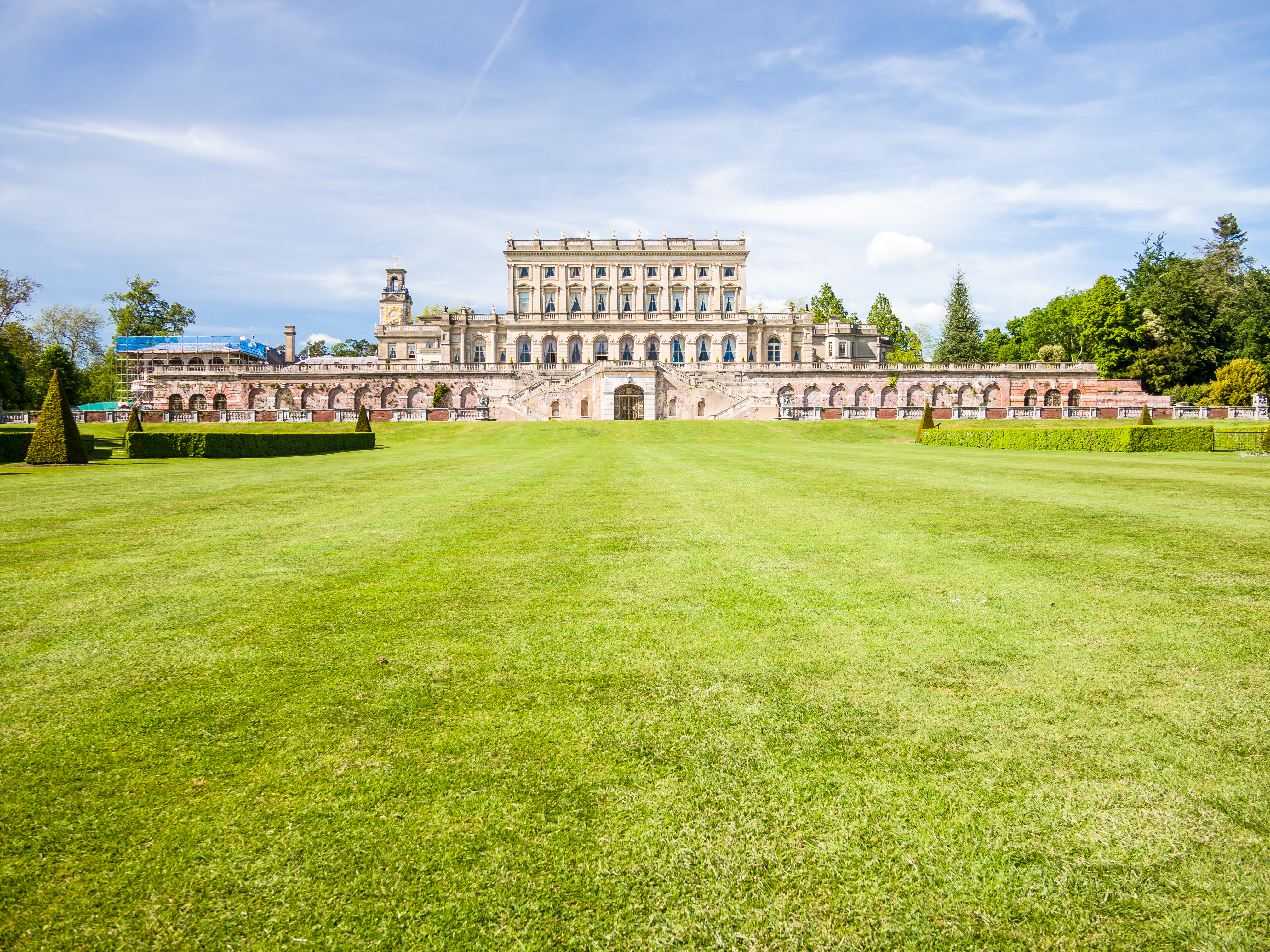 Cliveden